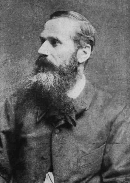 Vastagh György (1834–1922) festőművész portréja. Koller Károly fényképfelvétele